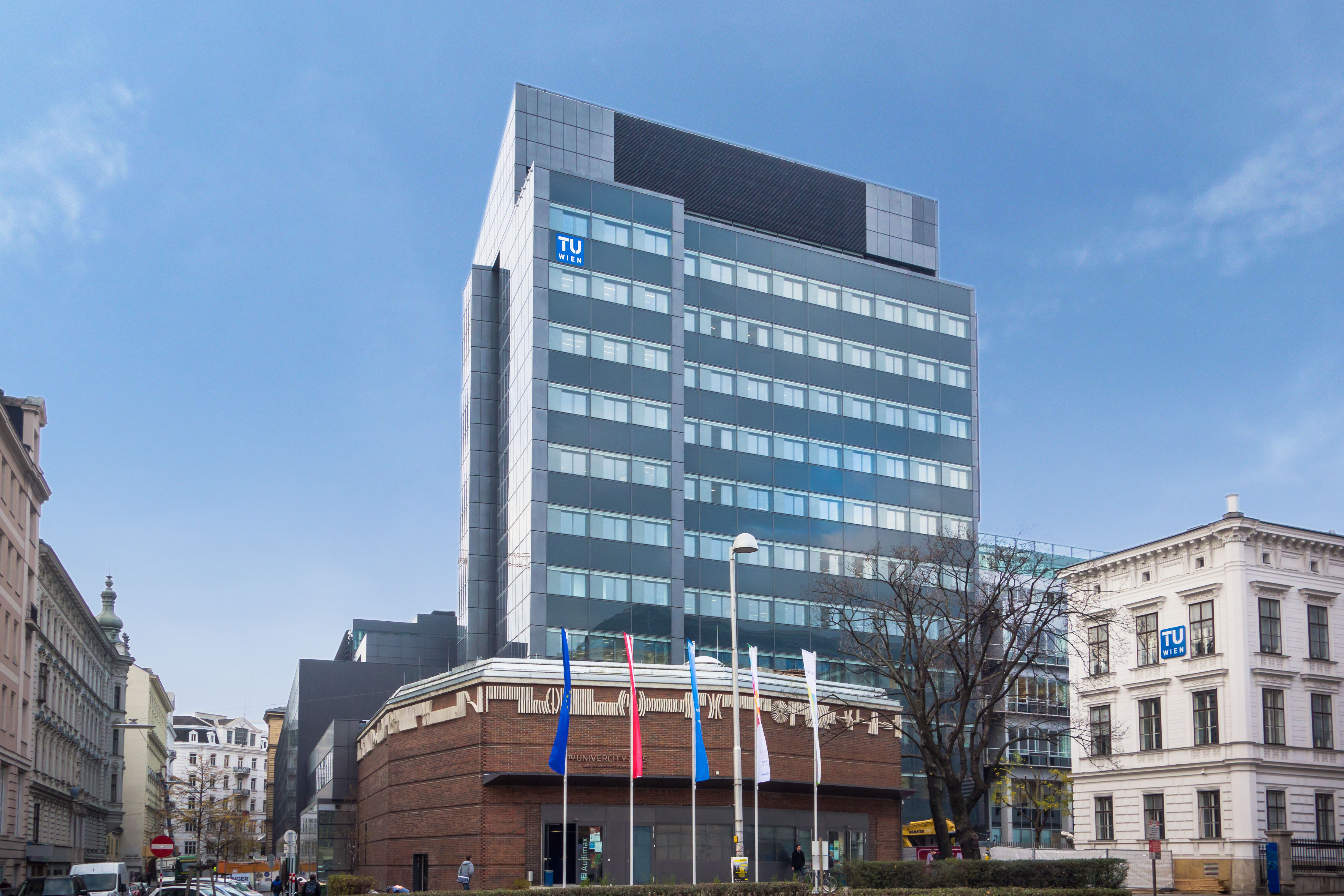 Weltweit erstes Plus-Energie Bürohochhaus, Österreichs größte gebäudeintegrierte Fotovoltaikanlage © Schöberl & Pöll GmbH